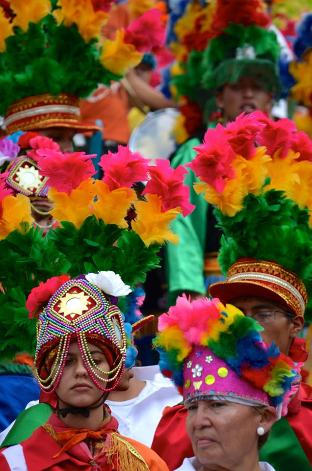 Matlachinada 2014.Evento que se realiza cada año, con Matachines de todo el estado de Coahuila